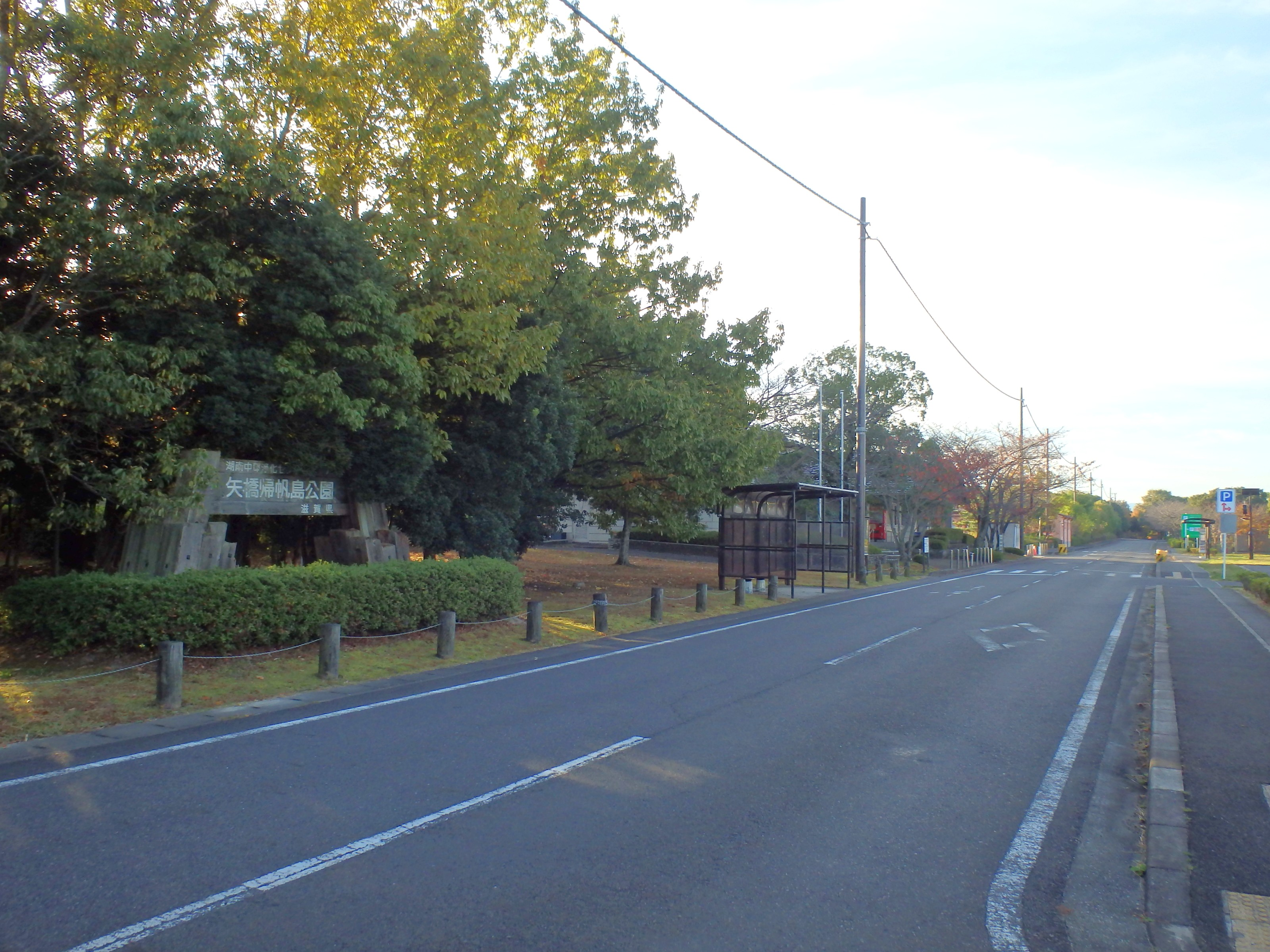 矢橋帰帆島公園